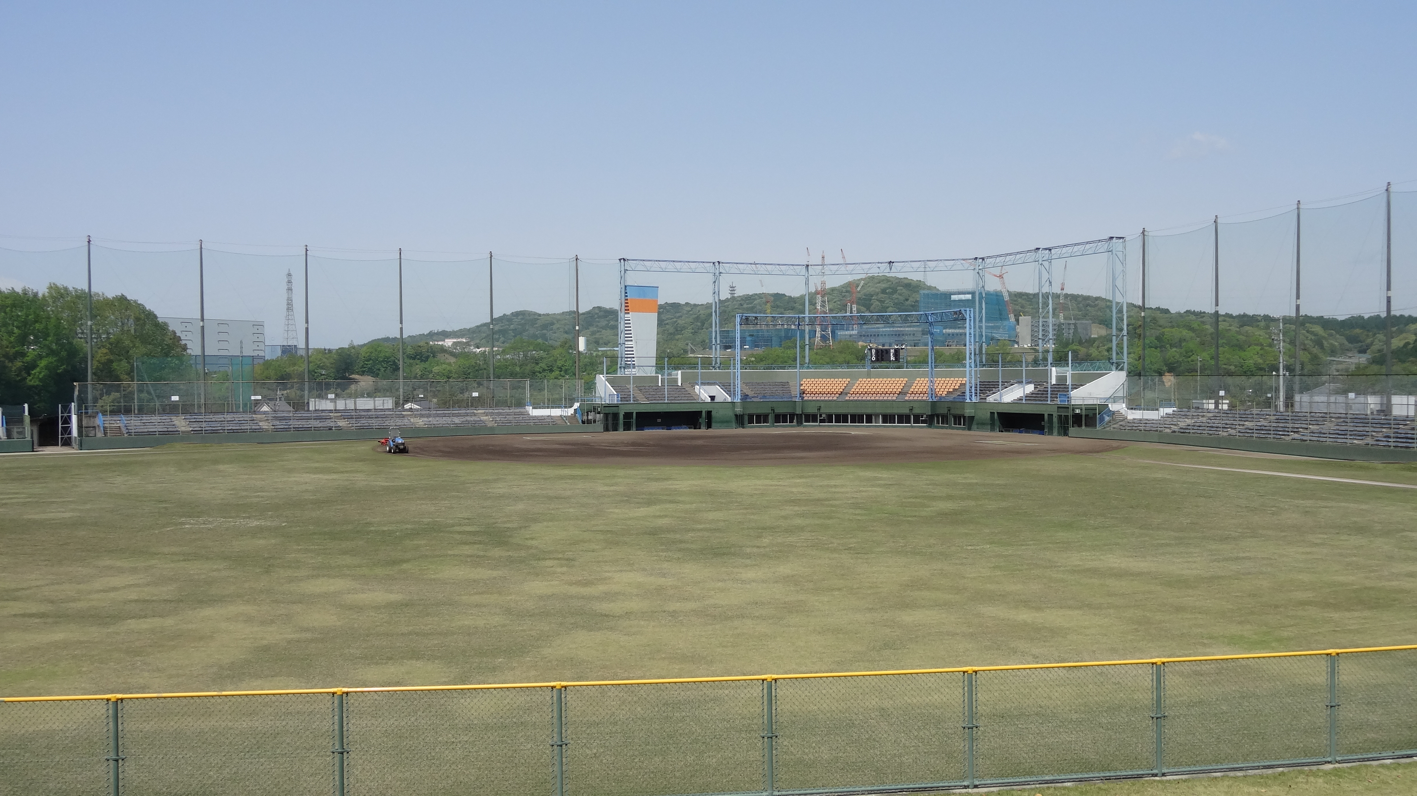 レフトスタンドより撮影